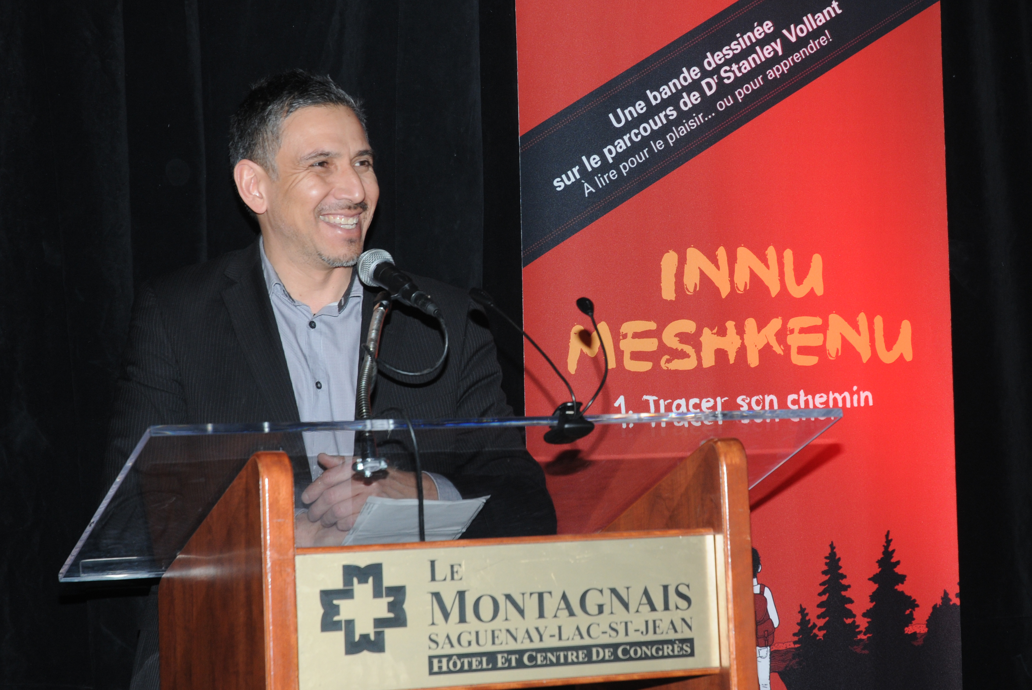 Lors du lancement de la bande dessinée Suivre son chemin.